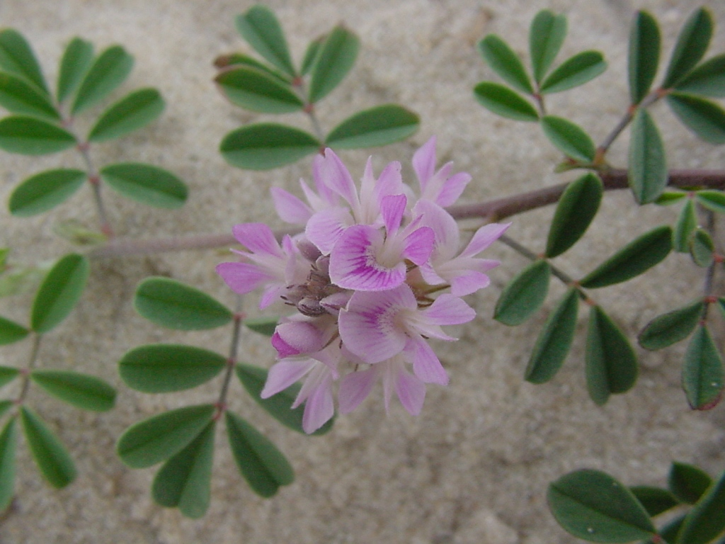 Indigofera sabulicola - FABACEAE - Lagoa dos Patos - Tavares ? RS - Brasil